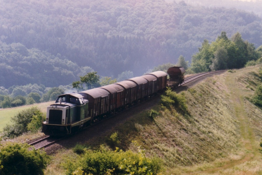 Güterzug zwischen Langenaubach und Flammersbach